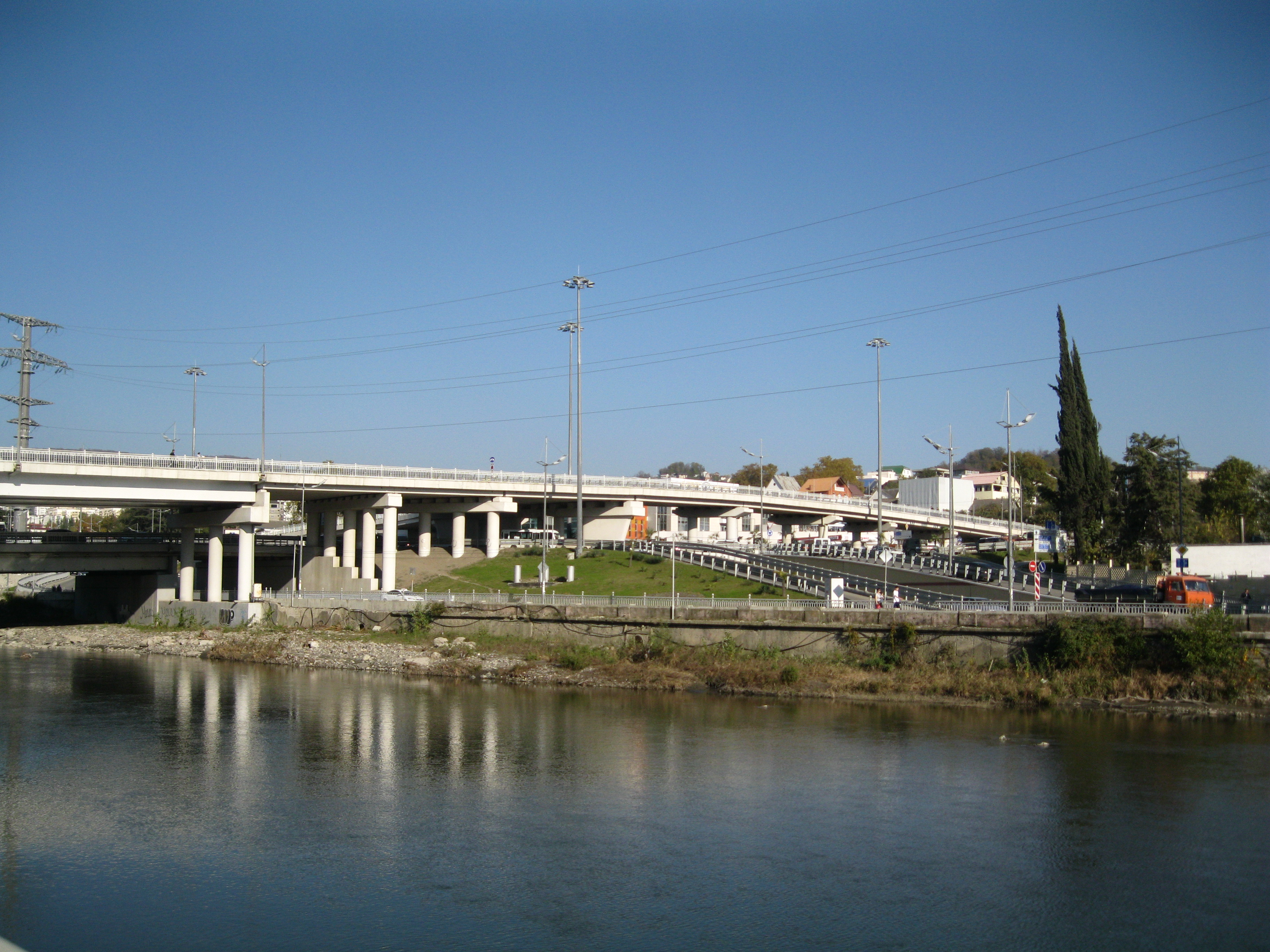 Краснодарское кольцо в Сочи с запада в 2013 году